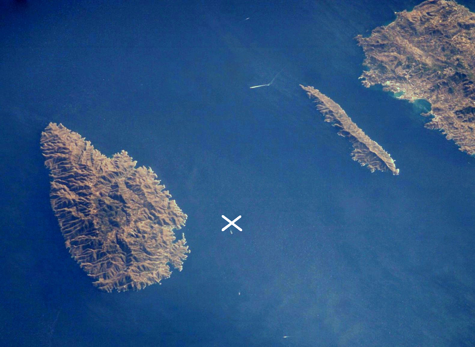 Canal de Kea, Grécia, com o local do naufrágio do Britannic marcado com um "X"